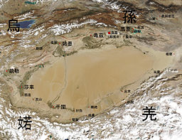 v roce 1 př.n.l